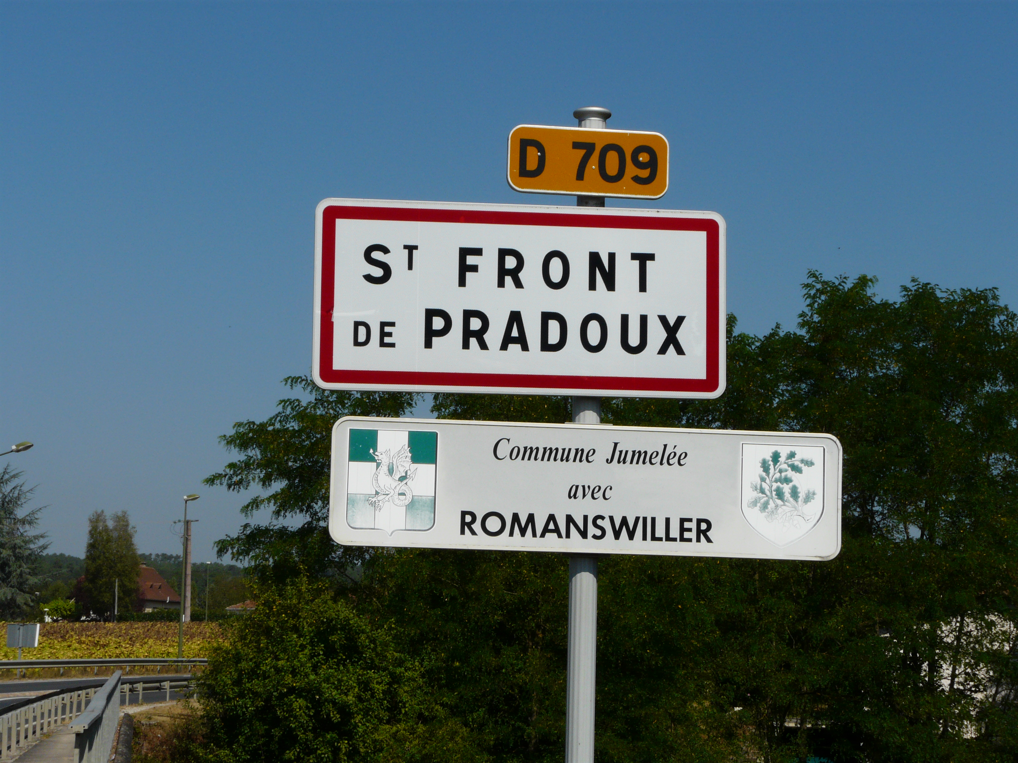 Panneau de jumelage de Saint-Front-de-Pradoux, Dordogne, France.